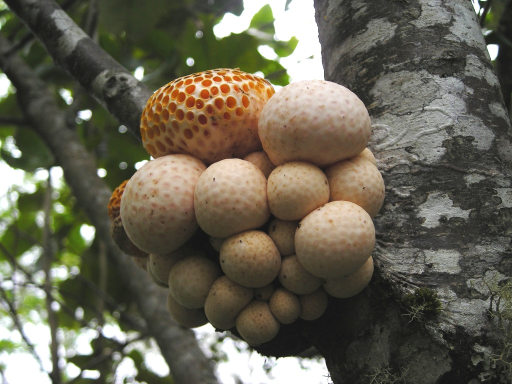 Dihueñes (Cyttaria darwinii) creciendo sobre un roble.